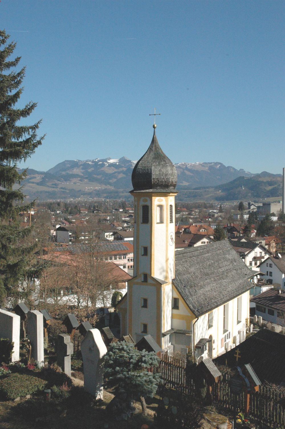 Alte Pfarrkirche Heilig Kreuz Kiefersfelden, im Vordergrund der Bergfriedhof, im Hintergrund der Geigelstein